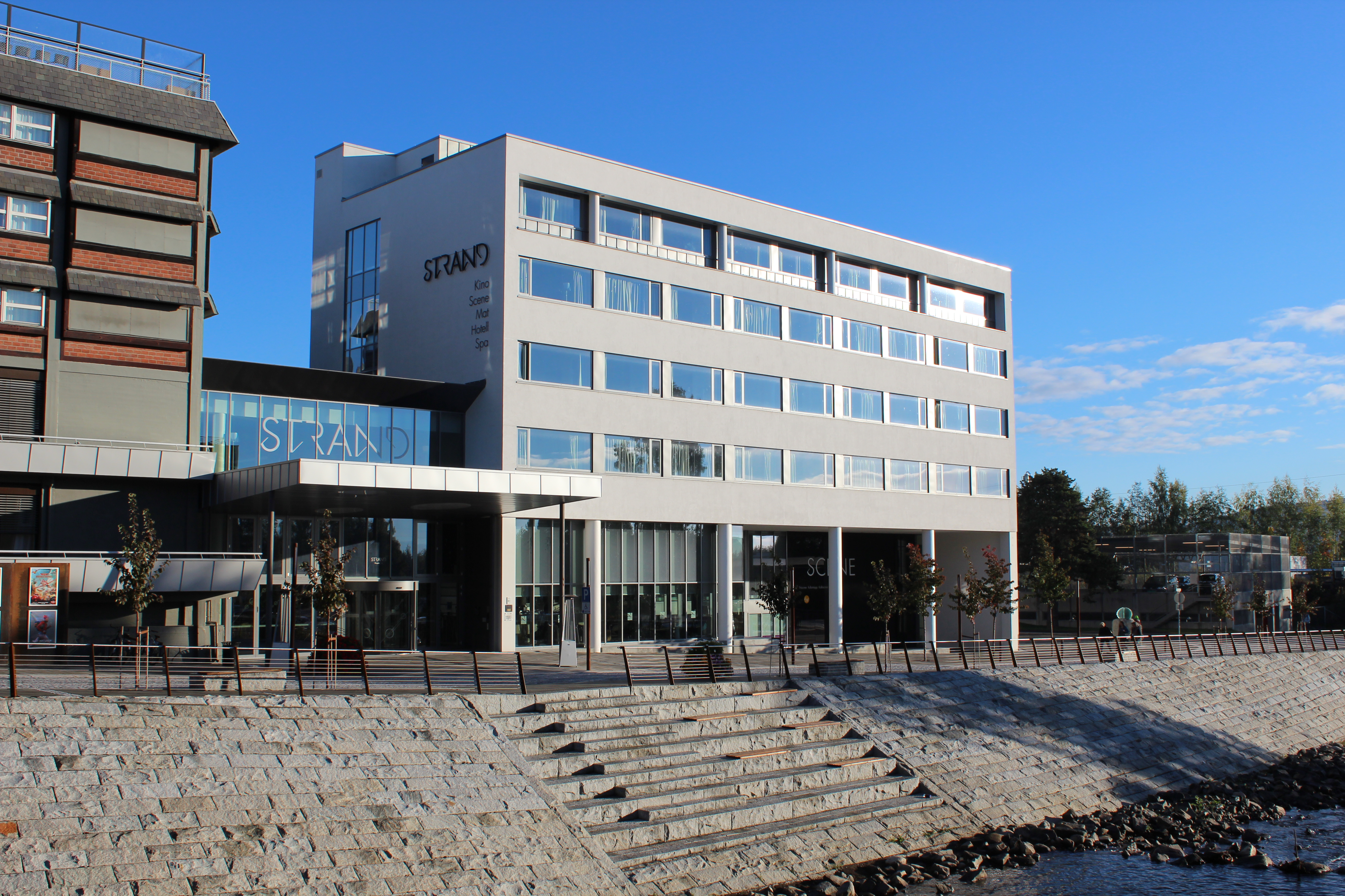 Gjøvik Kultursenter fra sørvest